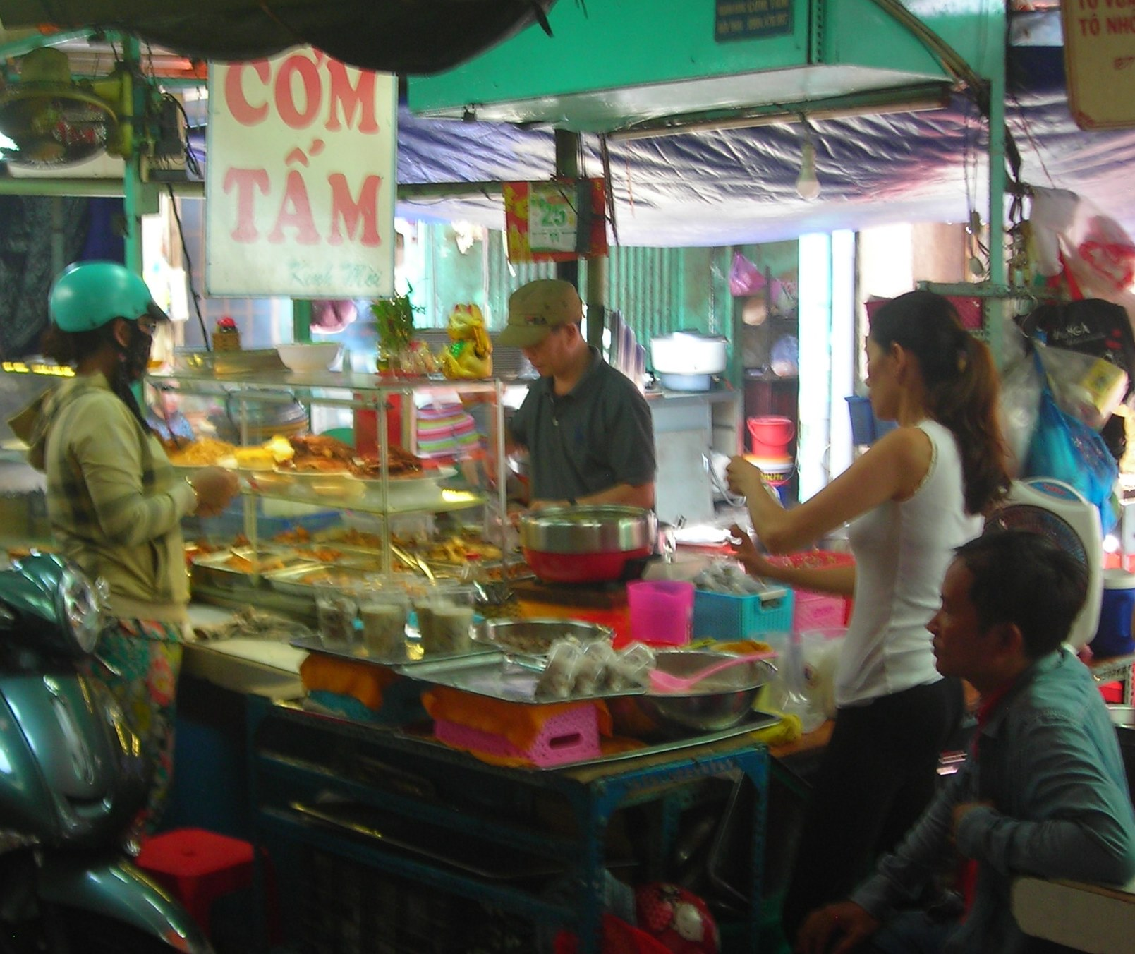 Étale de cơm tấm au marché